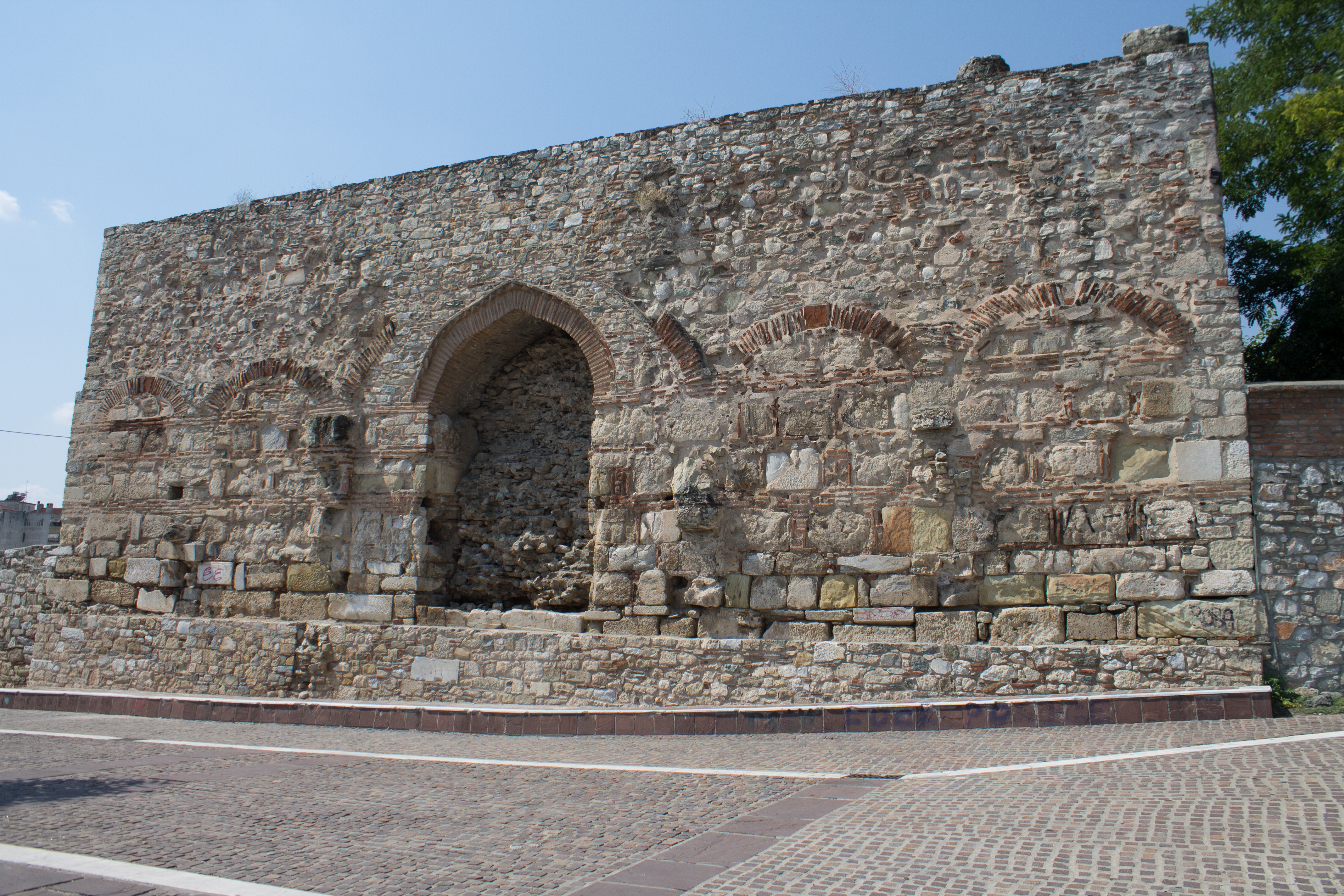 Μπεζεστένι, σκεπαστή οθωμανική αγορά υφασμάτων και πολύτιμων εμπορευμάτων, ανατολική πλευρά με χτισμένη πύλη«Αρχαιολογικός χώρος Φρουρίου Λάρισας»